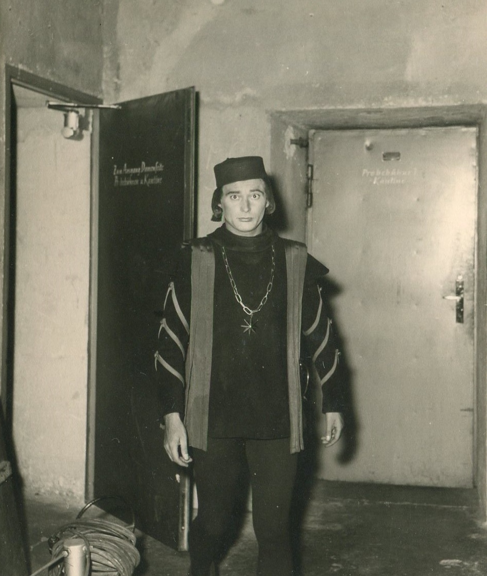 Schauspieler Werner Uschkurat 1957 hinter den Kulissen der Münchner Kammerspiele bei der Kortner-Inszenierung "Was ihr wollt" von Shakespeare